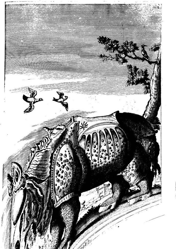 Логическая модель носорога. Иллюстрация из трактата "Opera: divisa in cinque libri ne'quali si tratta delle regole di Cavalcare, della professione di Spada, ed altri Esercici d'Armi... : con un Trattato del modo di curare l'infermità de'cavalli... : parimente con l'aggiunta d'alcune Rime, lettere e trattati di fisonomia, pittura, &c ; data in luce da Ettorre D'Alessandro..." Giuseppe D'Alessandro Antonio Muzio